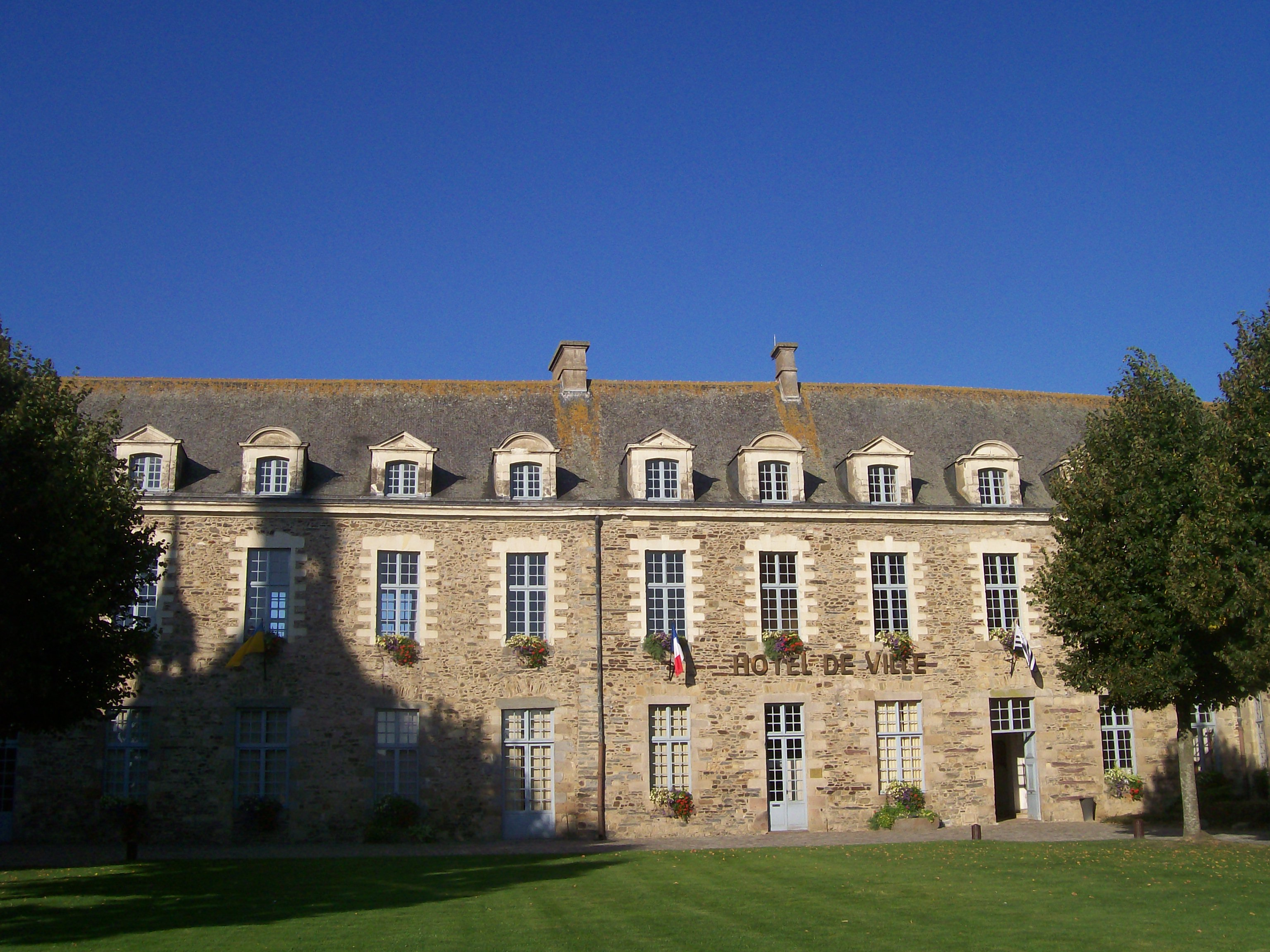 Vue de l'hôtel de Ville de Châteaugiron situé dans dans la cour du château.